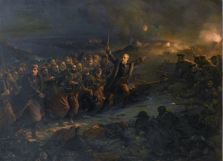 Attaque de la redoute de Selinghinsk par la brigade Monet, siège de Sébastopol, 24 février 1854 . Versailles, musée national du château et des Trianons.